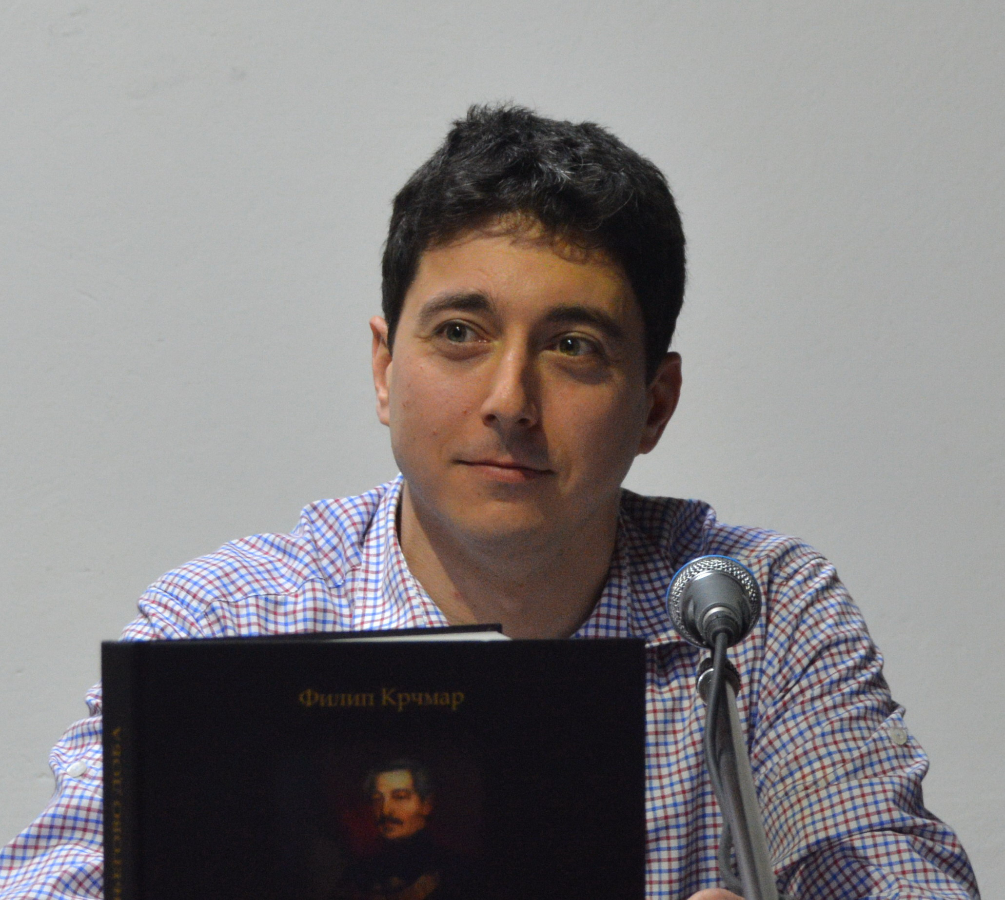 Filip Krčmar na promociji knjige "Laslo Karačonji i njegovo doba" u Novom Miloševu, 18. maj 2019. godine